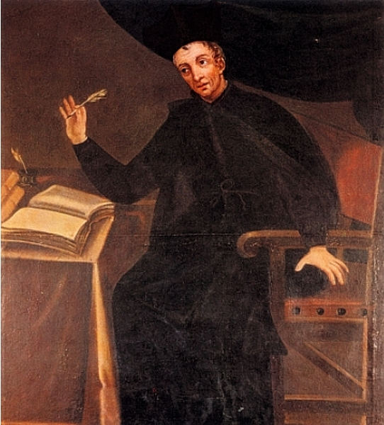 Retrato de Baltasar Gracián (localizado en la UNED de Calatayud)